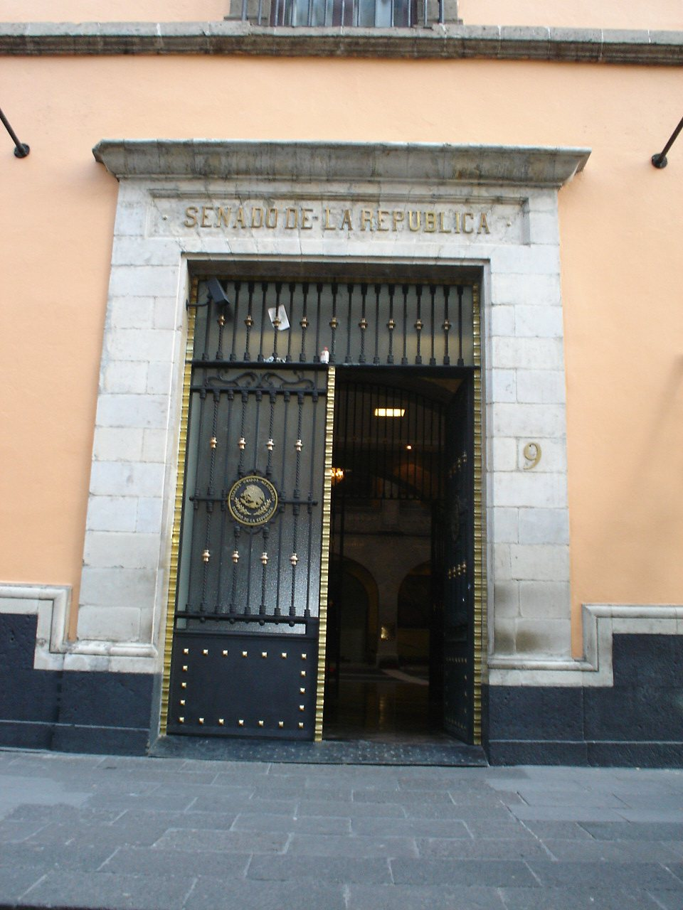 Entrada a la camara de senadores